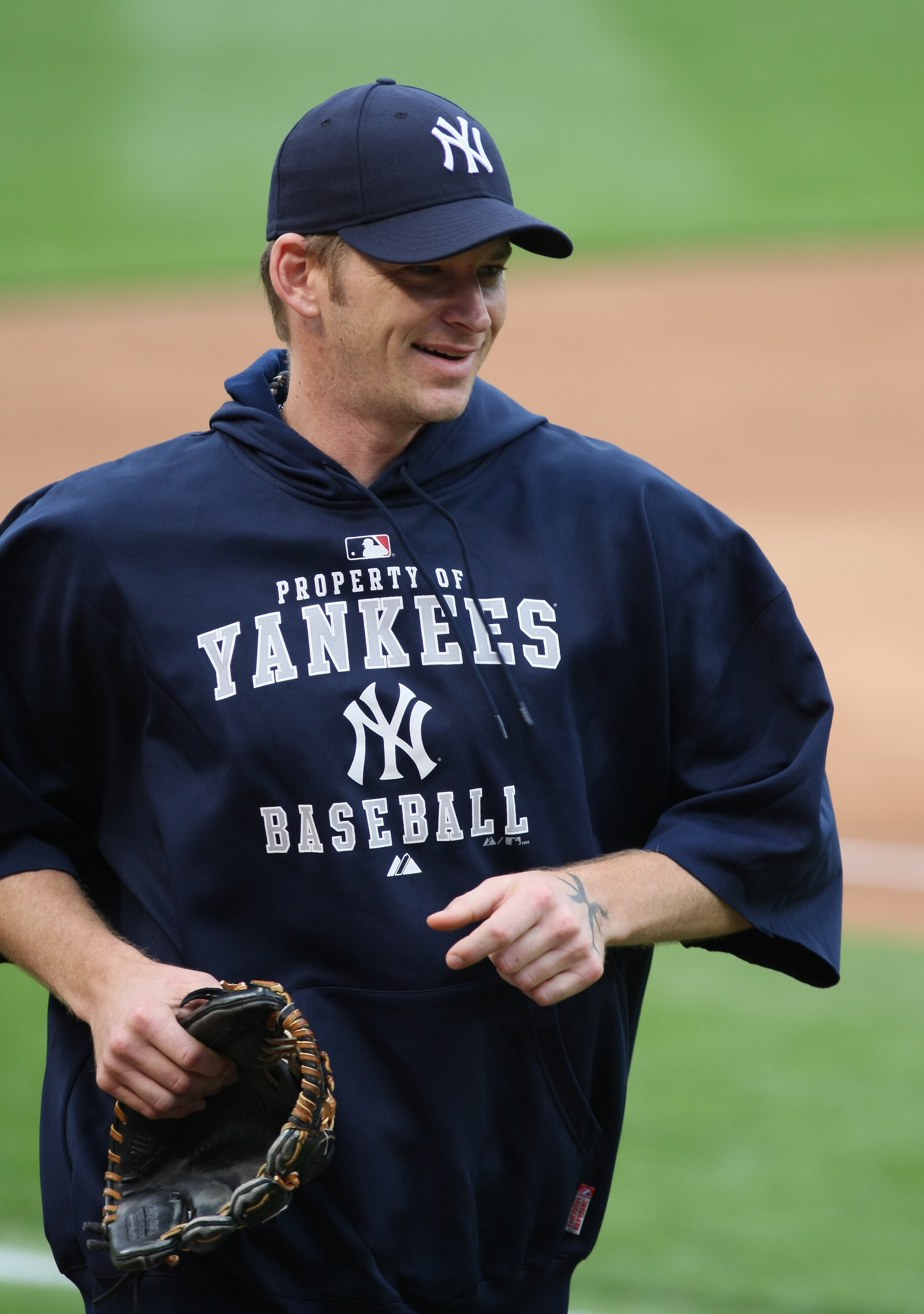 A. J. Burnett